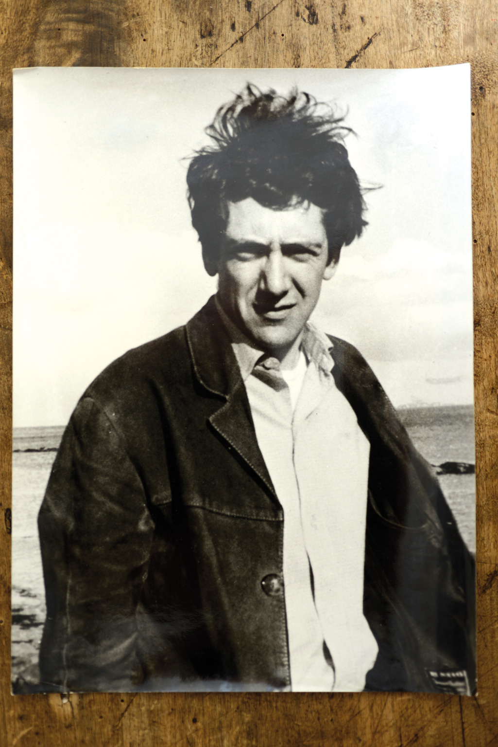 Marie-Claude White, Portrait de Kenneth White en Écosse